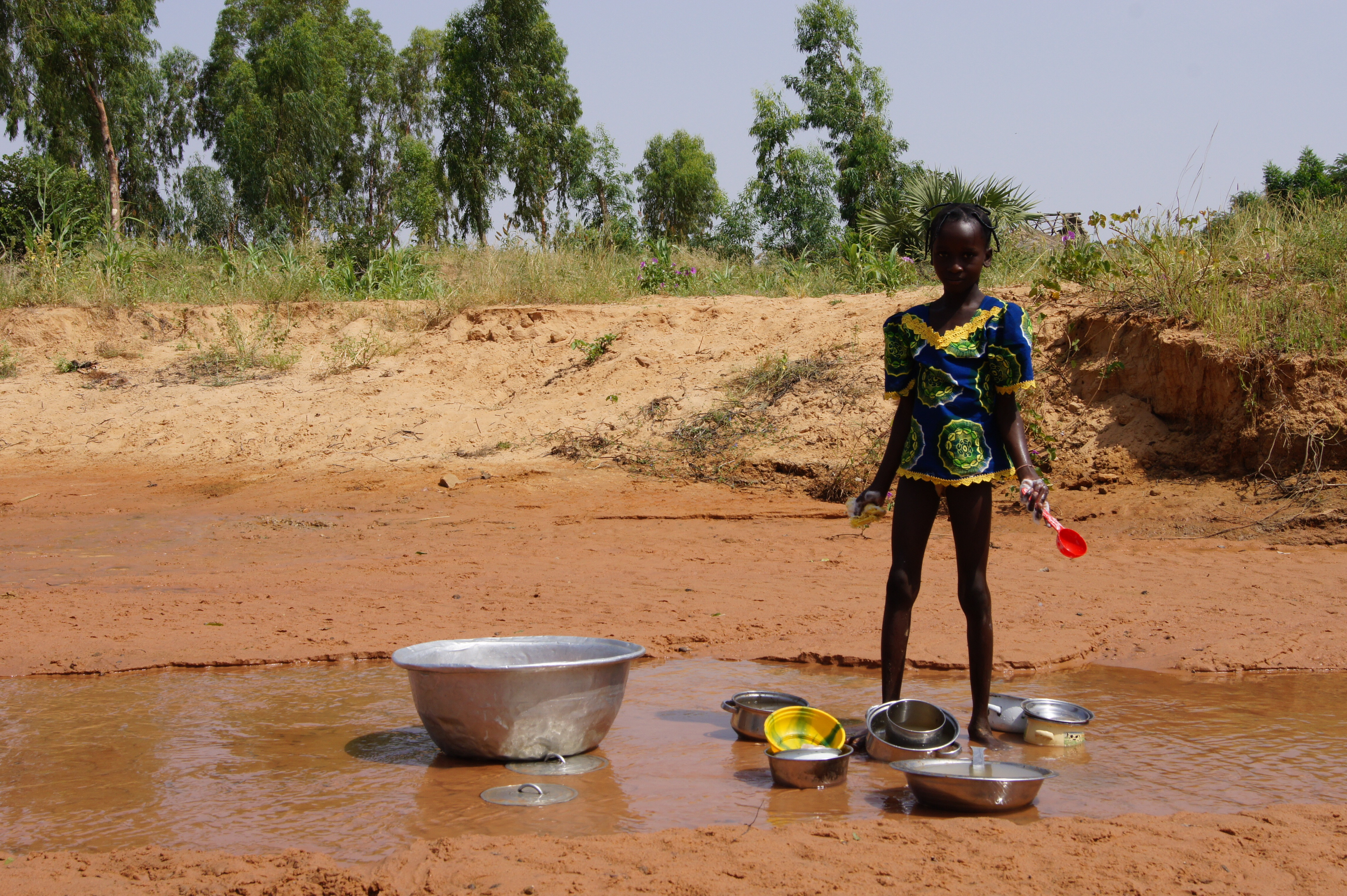 Jeune fille nigérienne lavant la vaisselle, en brousse This is an image of "African people at work" from Niger